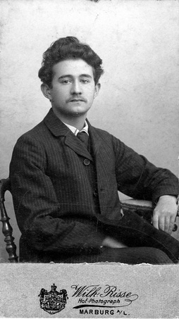 אליהו בלומנפלד. בא מרוסיה. קנה 1000 דונם ליד הקואופרציה מרחביה; 1912 - / קואופרציה